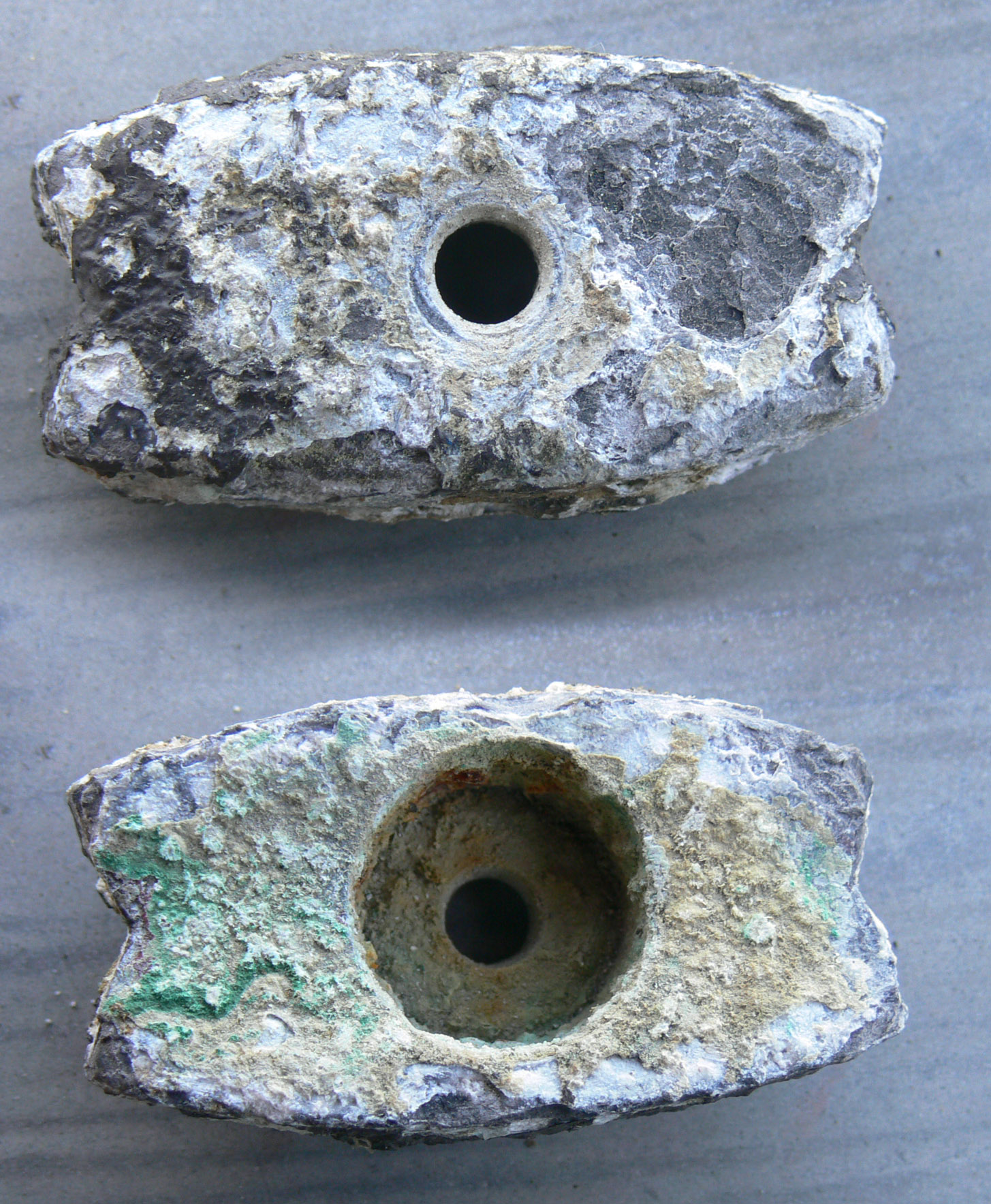 anode sacrificielle fixée sur des parties métalliques immergées de bateaux pour en limiter la corrosion (source de pollution du milieu). Recto et verso